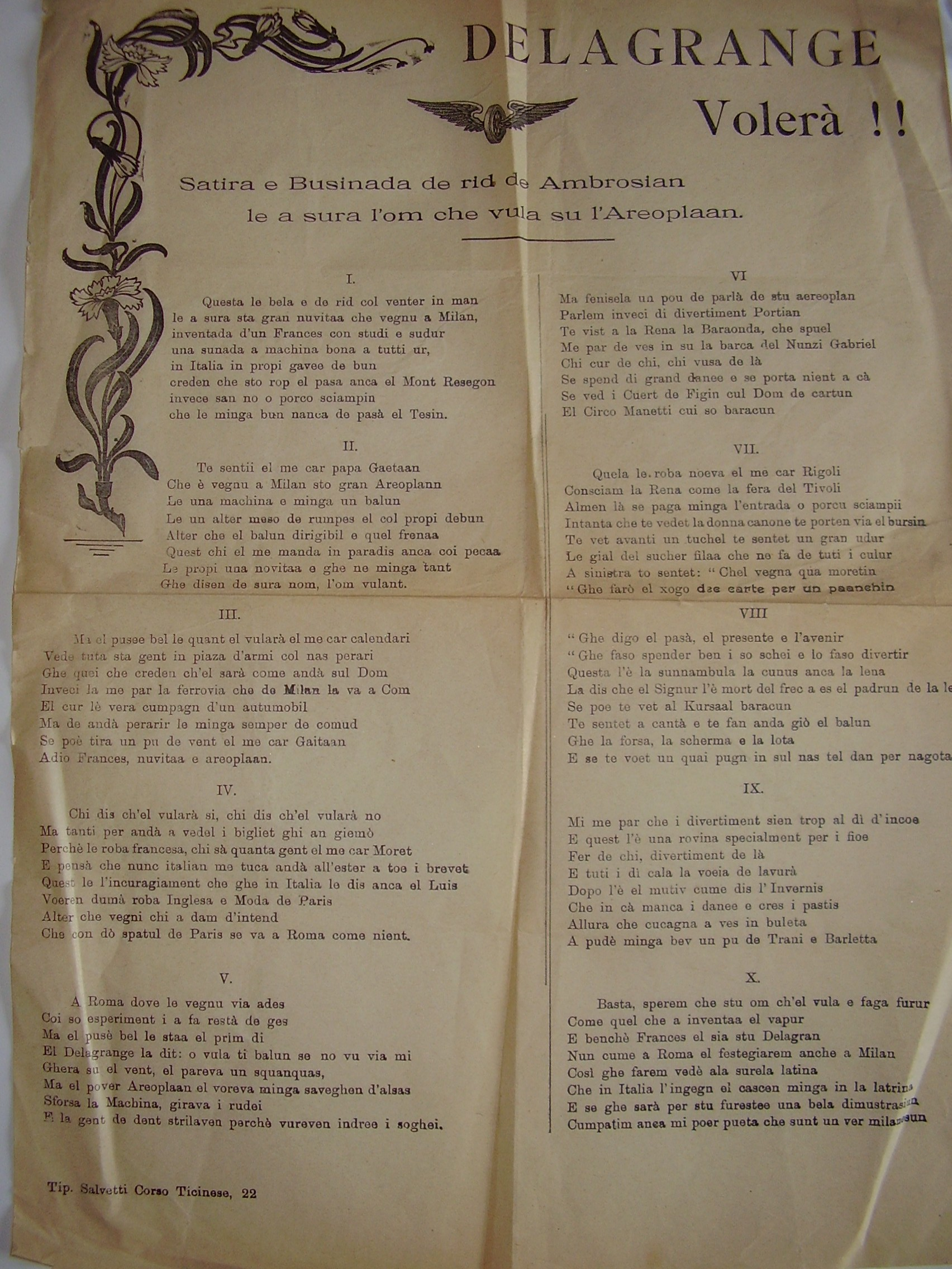 A Milanese "bosinada" (1908)